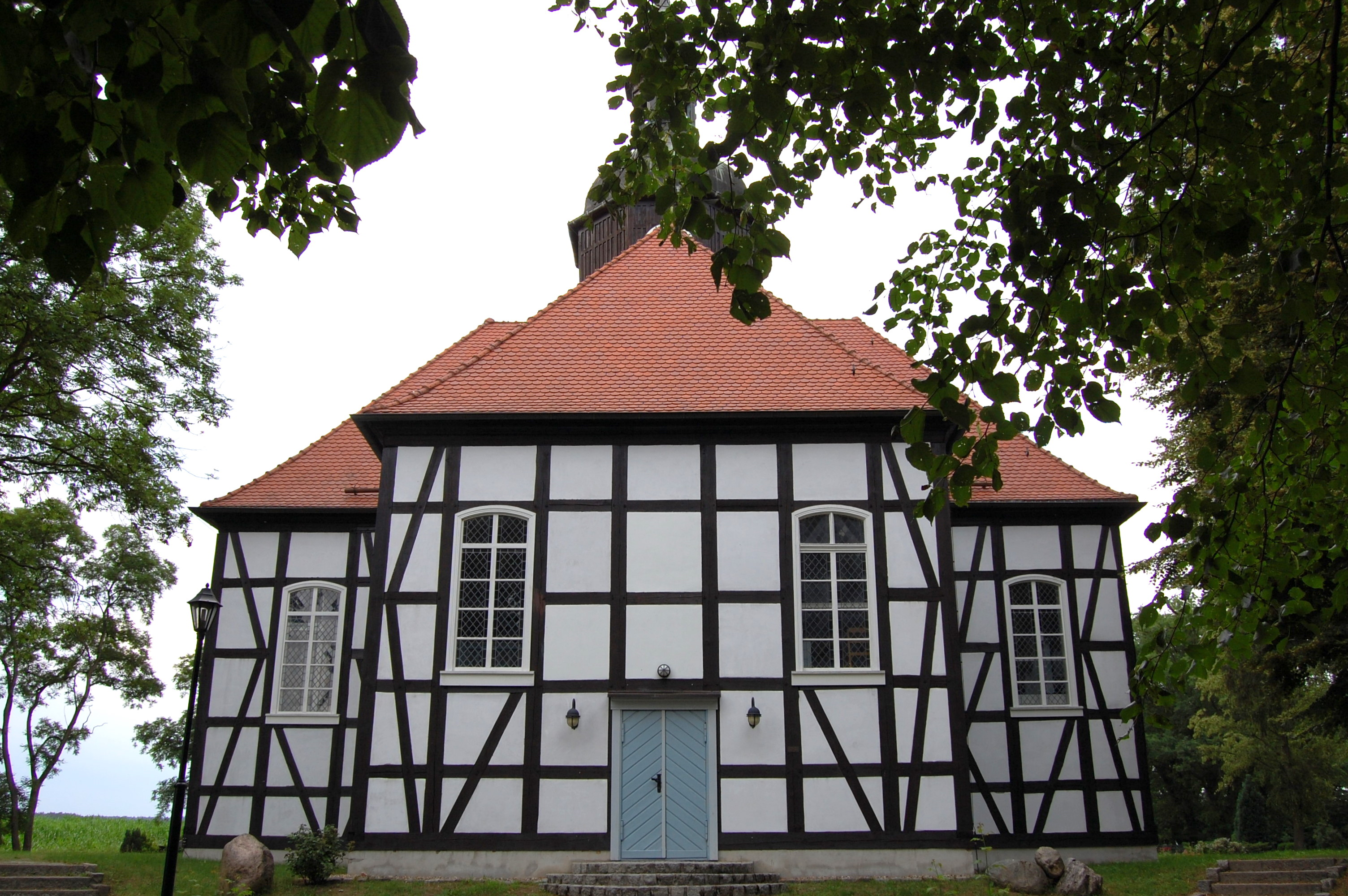 Dorfkirche Krausnick, Südseite